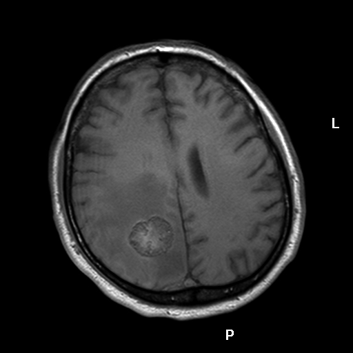 MRT einer Hirnmetatase eines Bronchialkarzinoms (T1 ohne Kontrastmittelgabe)